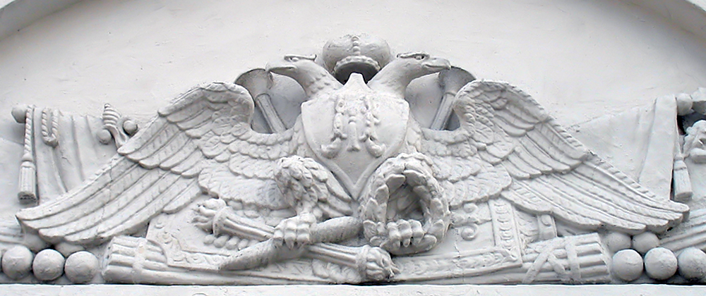 Горельеф двуглавого орла с вензелем Николая I на кордегардии у Петербургской заставы